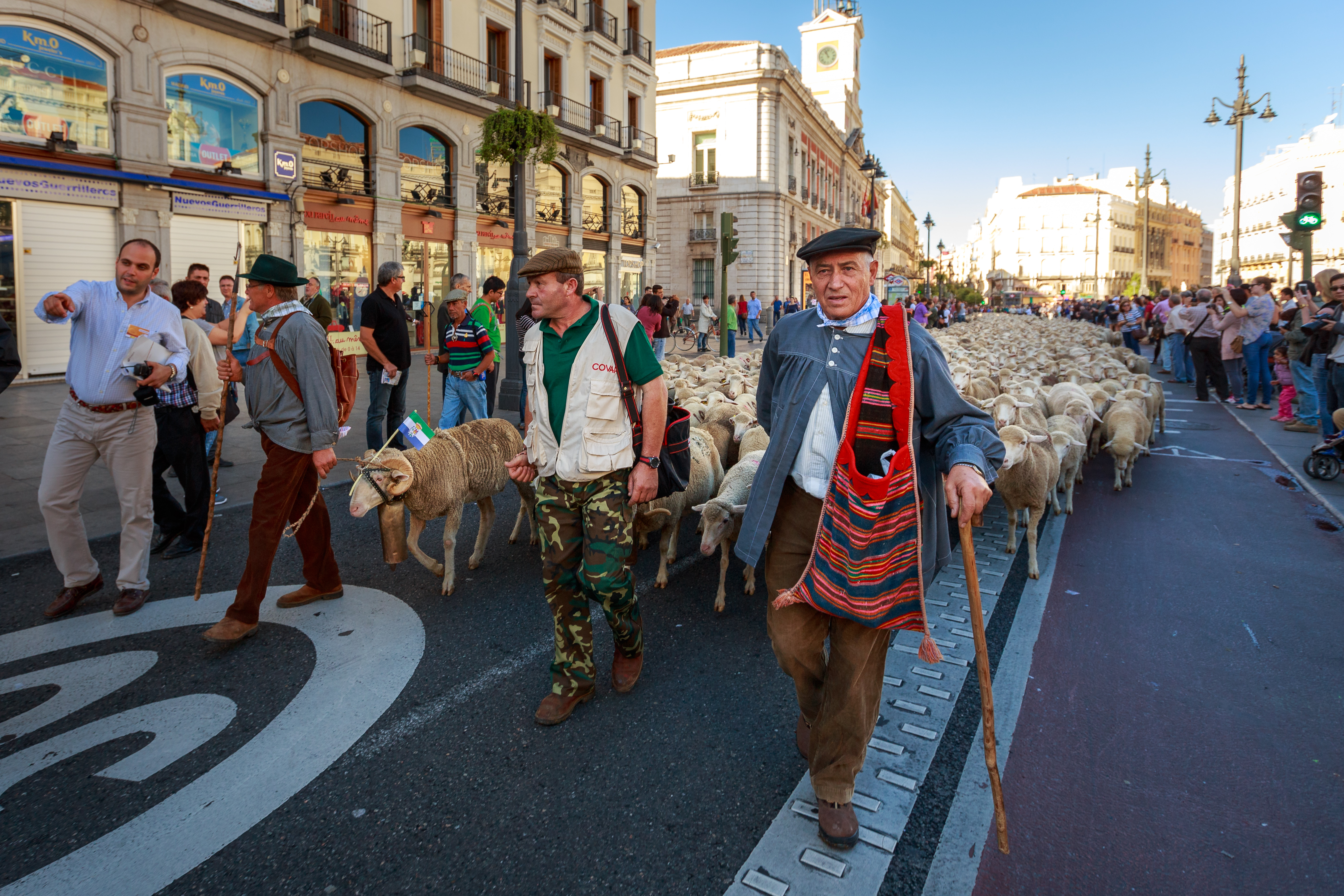 XX fiesta de la trashumancia, Madrid. El rebaño compuesto por 2000 ovejas transitando por la Puerta del Sol.